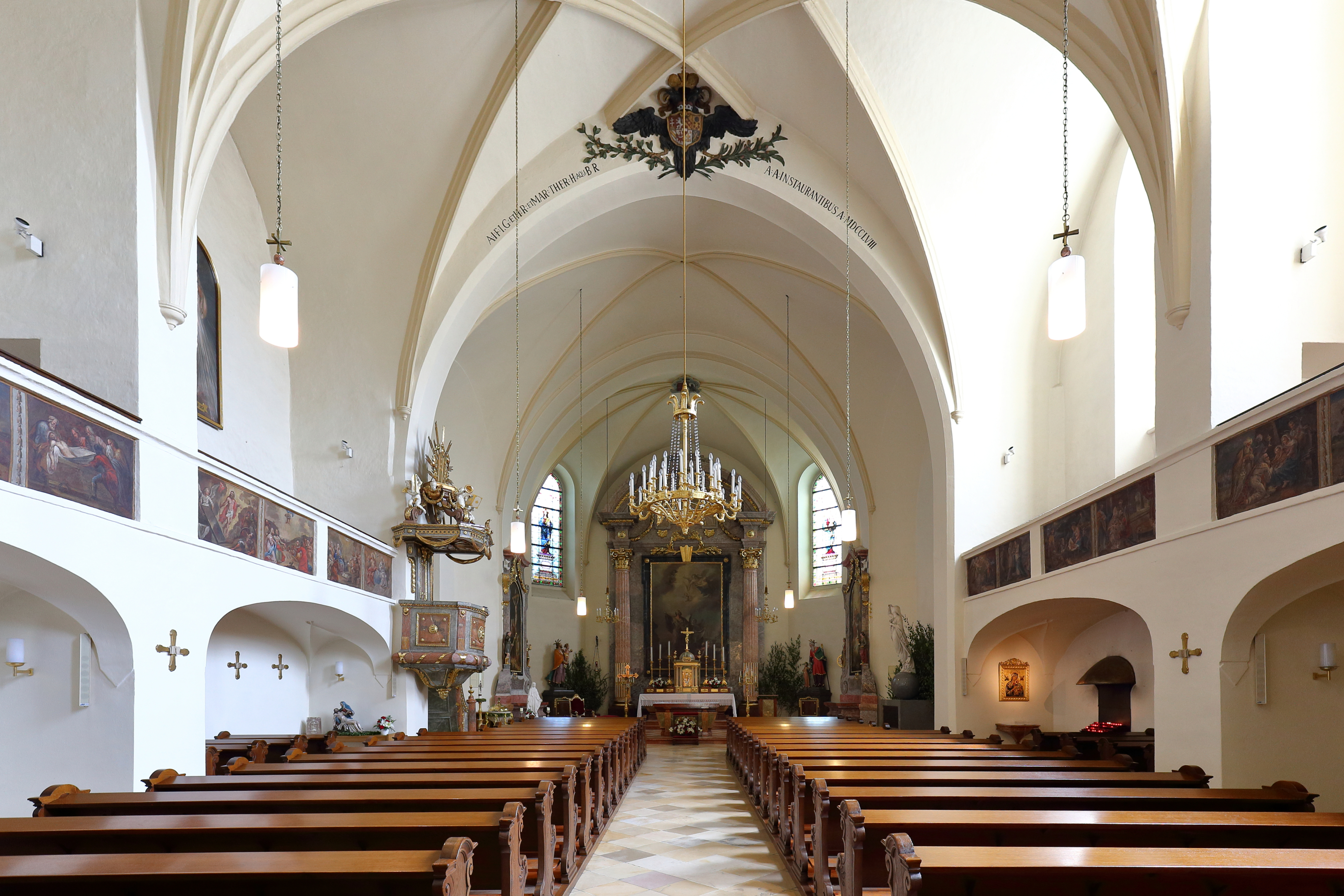 Innenansicht der Penzinger Pfarrkirche St. Jakob im 14. Wiener Gemeindebezirk Penzing.